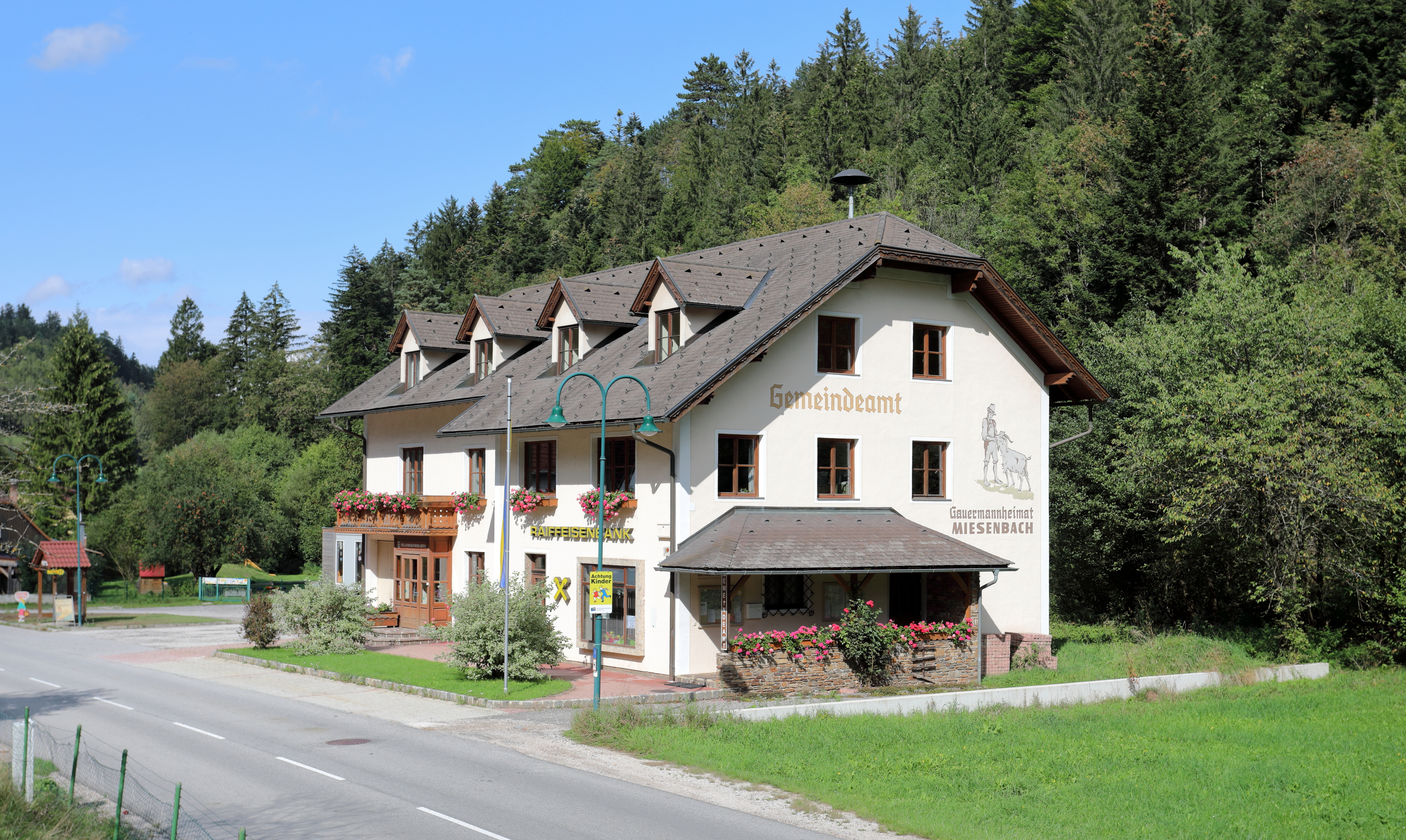 Das Gemeindeamt der niederösterreichischen Gemeinde Miesenbach.